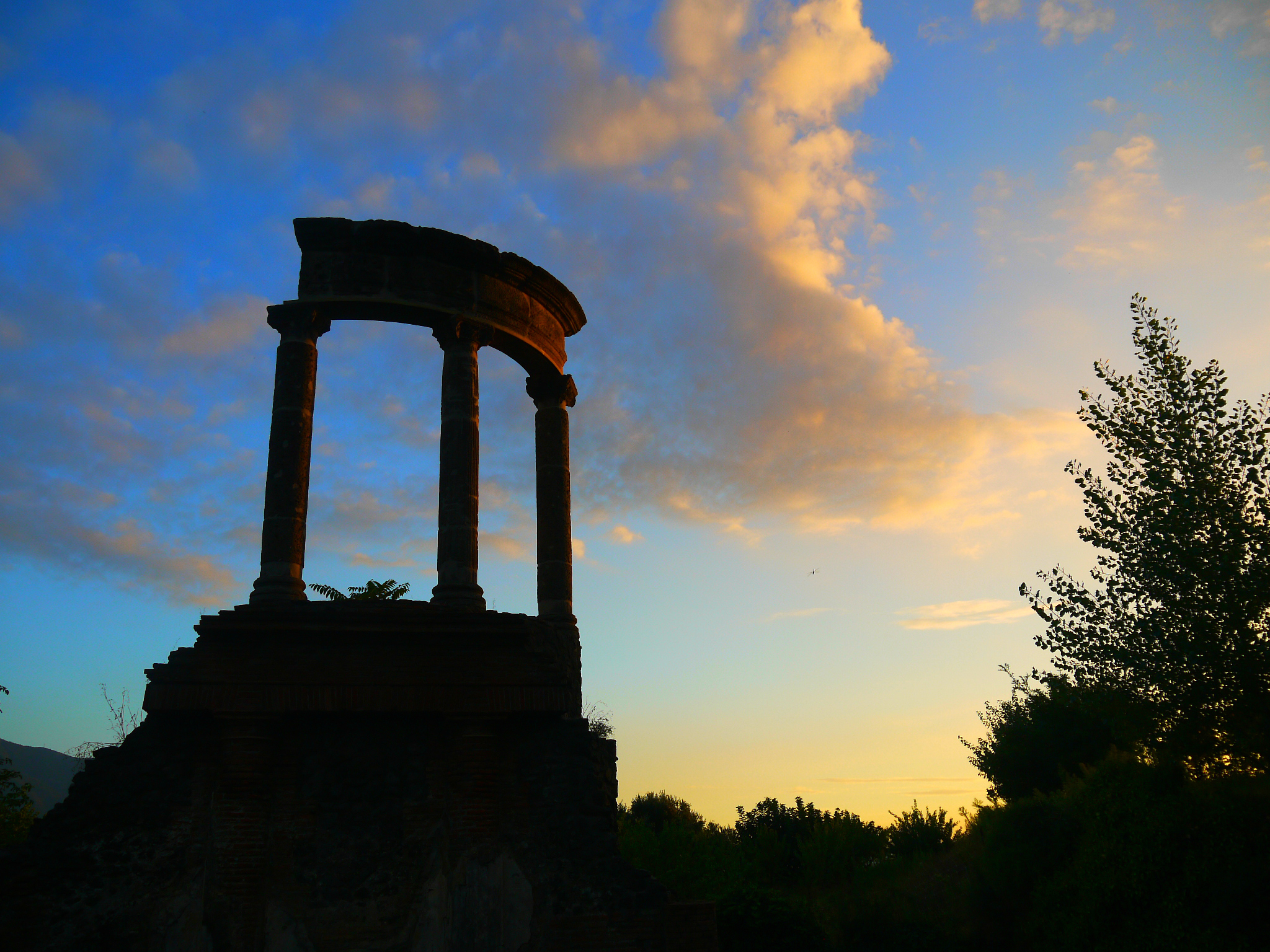 Tomba di N. Istacidius Helenus - MIBACT This is a photo of a monument which is part of cultural heritage of Italy.